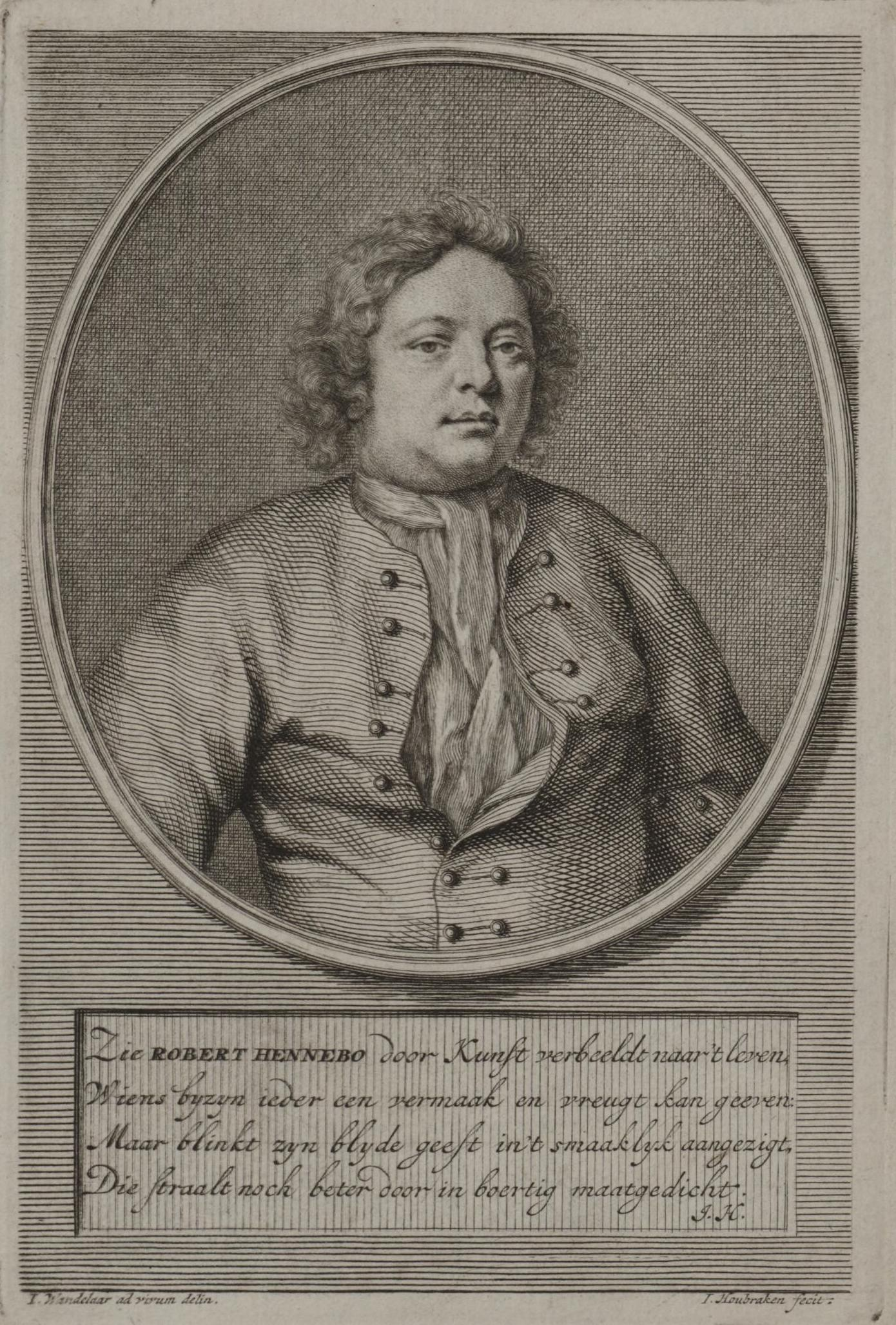 Detail van een portret van Robert Hennebo (ca 1685-1737)